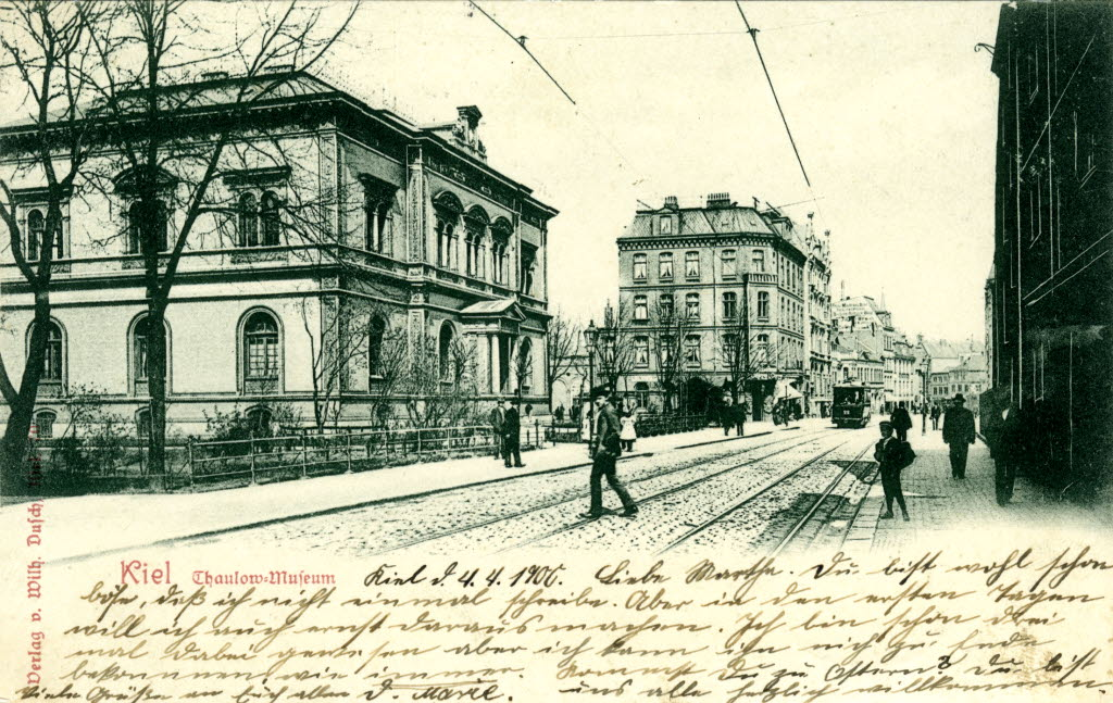 Thaulow-Museum am Sophienblatt 2 (Ecke Ziegelteich)